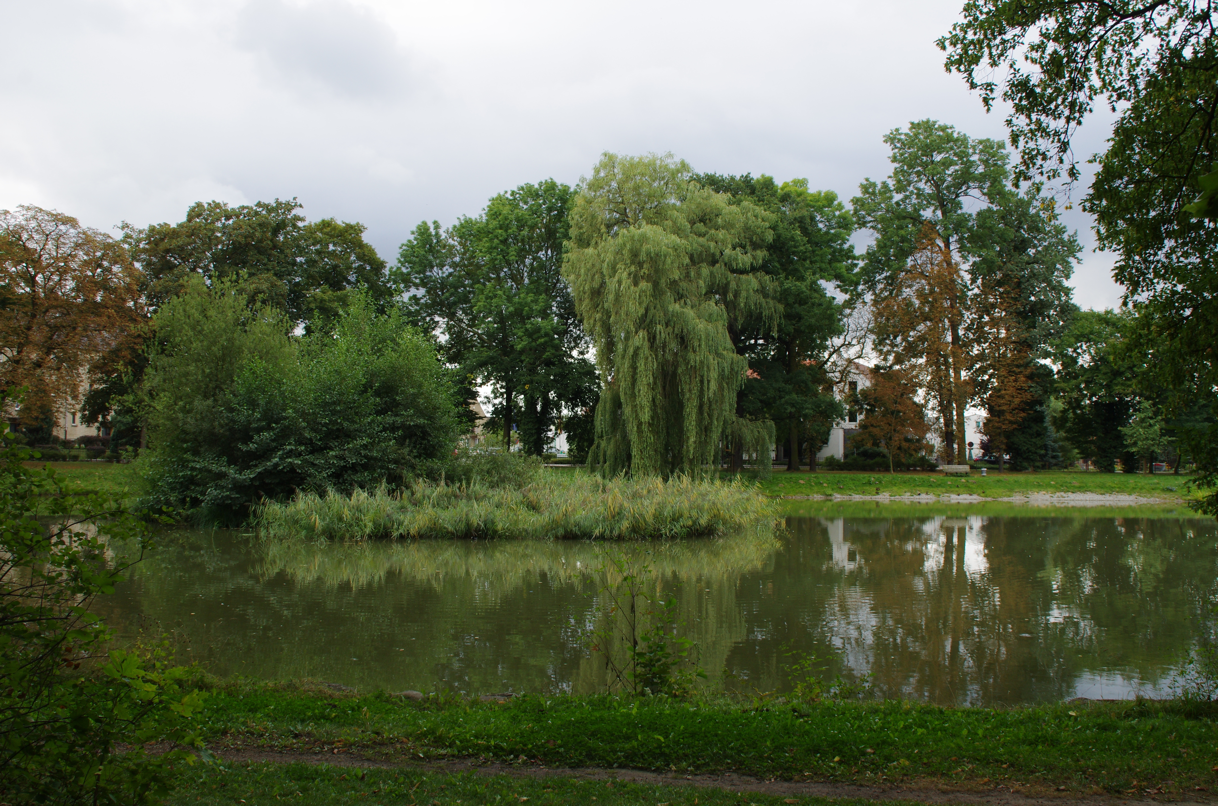 Golßen in Brandenburg. Der Schlosspark steht unter Denkmalschutz.